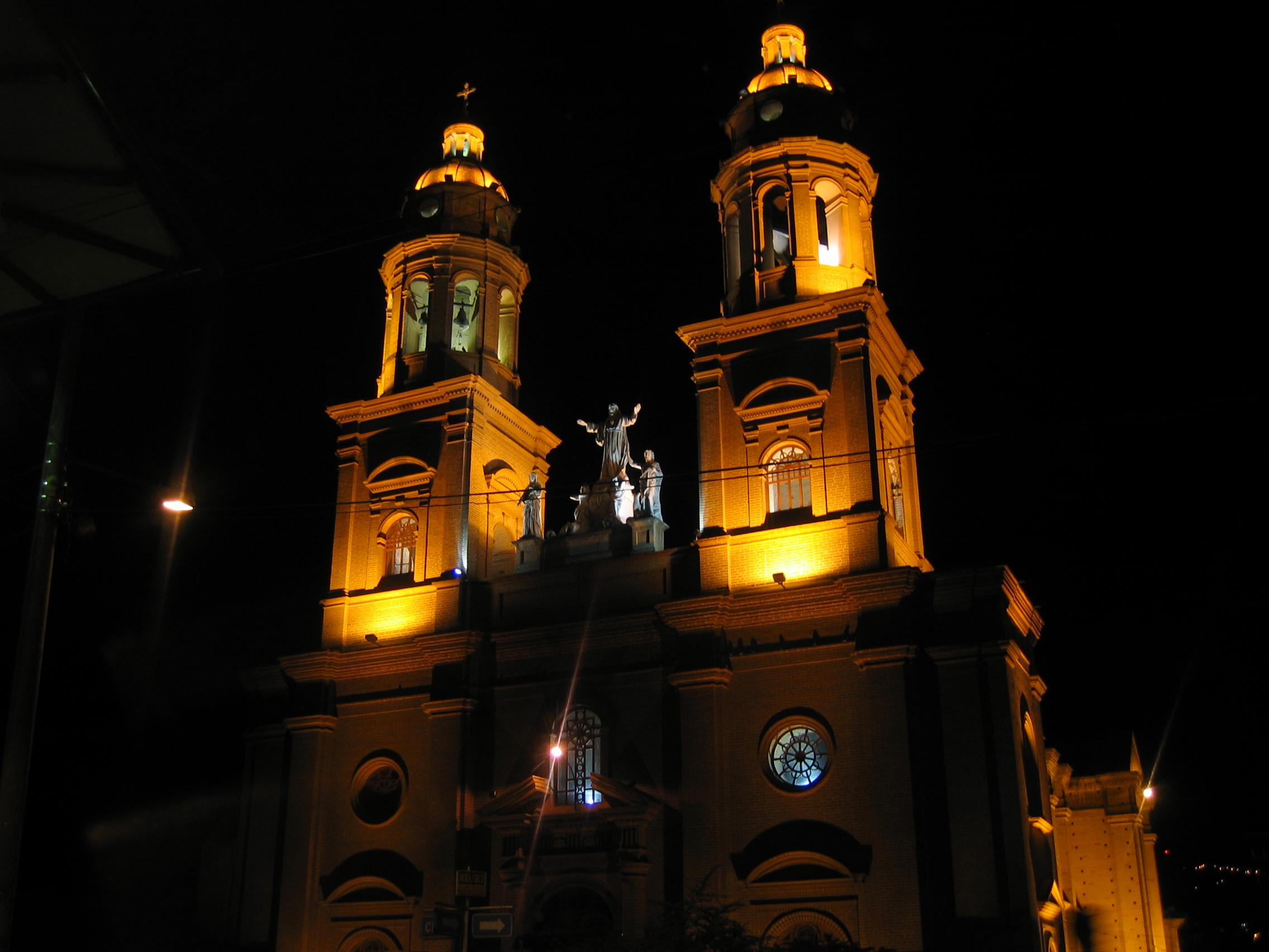 La hermosa Catedral de Pasto adornada por las luces mientras murmuran una oración sus campanas.